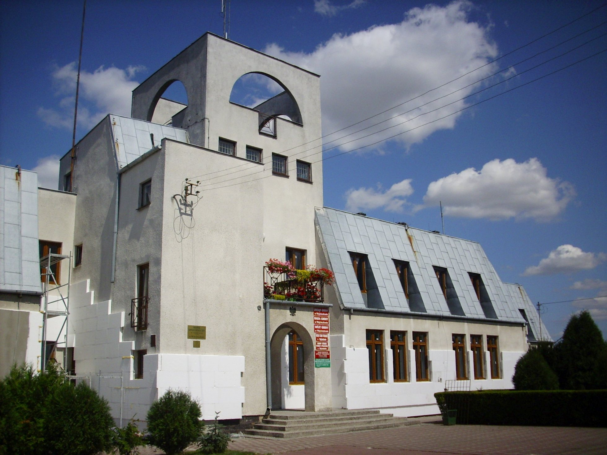 Wojcieszków. Urząd Gminy mieszczący się w budynku o dość awangardowych kształtach.